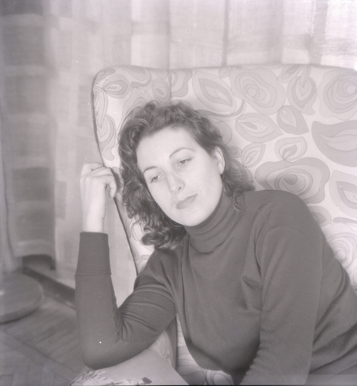 Servizio fotografico : Milano, 1963 / Paolo Monti. - Buste: 21, Fototipi: 21 : Negativo b/n, gelatina bromuro d'argento/ pellicola ; 6x6. - ((Serie costituita da 21 buste di carta identificate con i nn.: 10206, 10207, 10208, 10209, 10210, 10211, 10212, 10213, 10214, 10215, 10216, 10217, 10218, 10219, 10220, 10221, 10222, 10223, 10224, 10225, 10226. - Sulla busta 10206: "Milena". - Fonte: Agenda di Paolo Monti: Monti/ 2/ 6 giugno 1964 - 31b marzo 1966/ 8194-12420 (1964-1966), presso Archivio Paolo Monti. - Fonte: Agenda di Paolo Monti: Archivio fino 1-4-1961/ 31-3-1963 (1961-1963), presso Archivio Paolo Monti